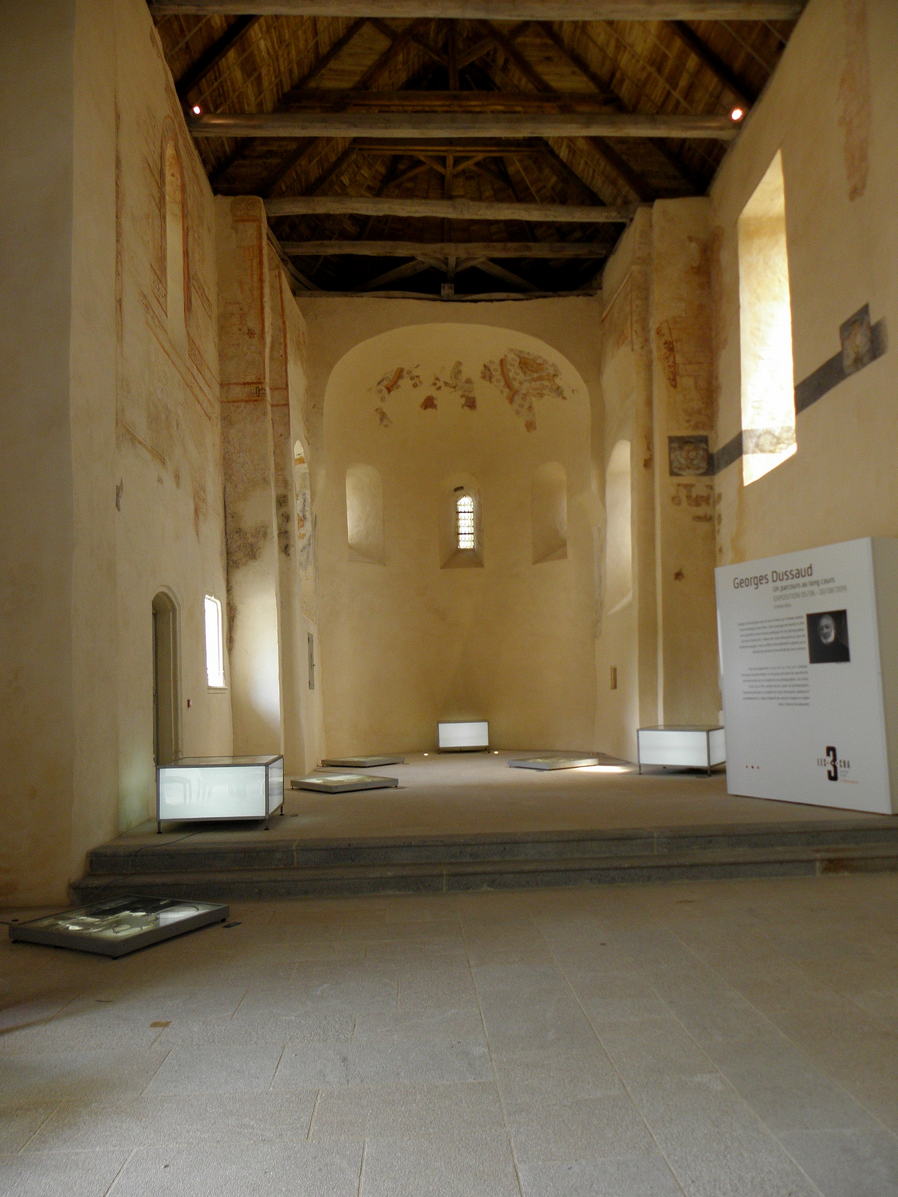 Intérieur de la chapelle Sainte-Marie-Madeleine du château de Châteaugiron (35).